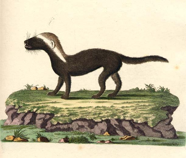 Galictis vittata, plate from Schreber, Johann Christian Daniel von, Histoire naturelle des quadrupèdes représentés d´après nature. Tome III. Le phoque, le chien, le chat, le putois, la loutre, la marte, l'ours, le didelphe, la taupe, la souris, le hérisson A Erlang, chez Wolfgang Walther, 1780